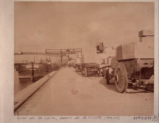 Le quai de la Loire du bassin de la Villette (Paris) vers 1903-1908, par Eugène Atget